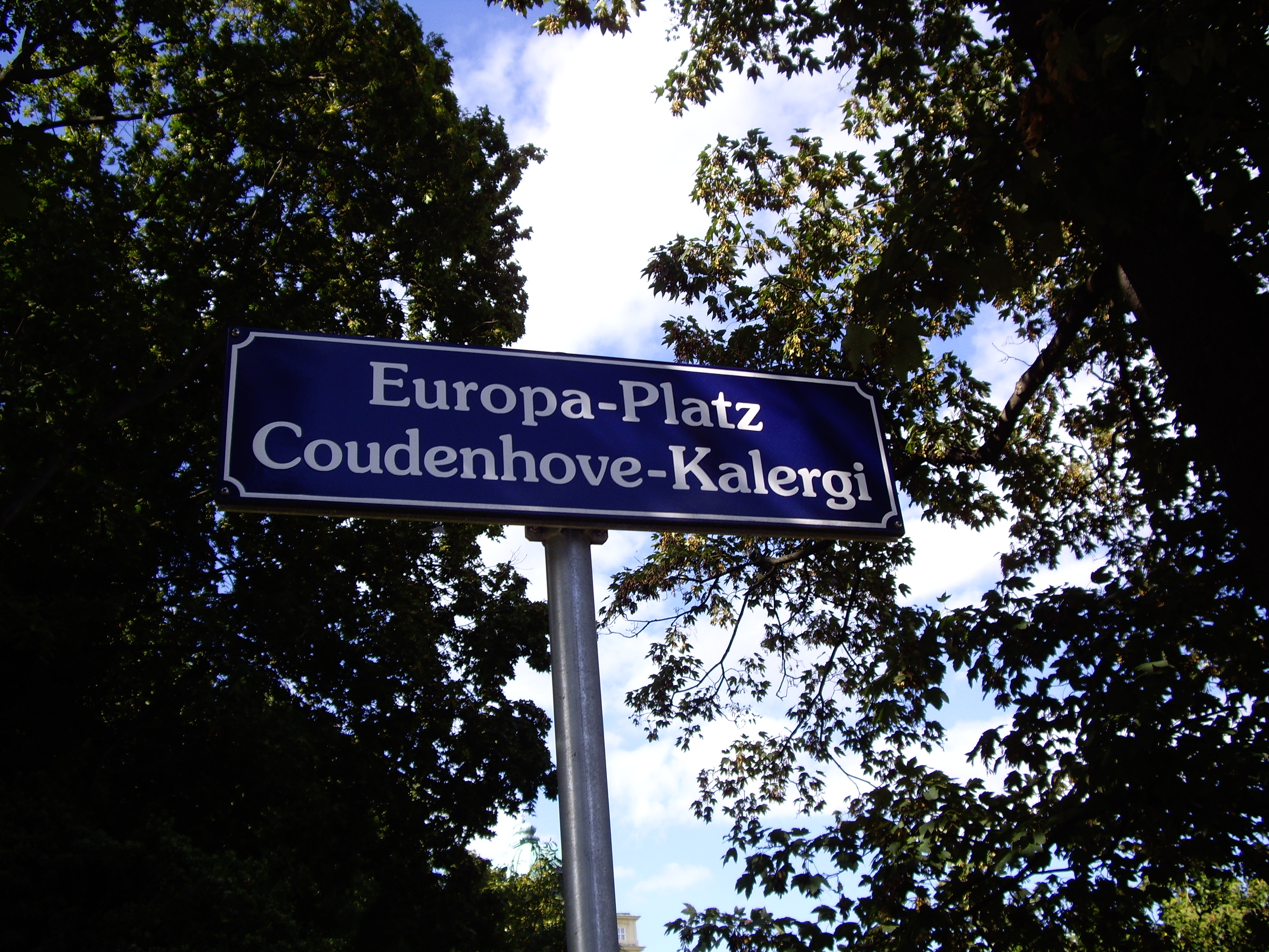 La stratoŝildo "Eŭropo-placo - Coudenhove-Kalergi" en la Patro-Abel-strato de Klostronovburgo, Urbo de la Interpopola Kompreniĝo.